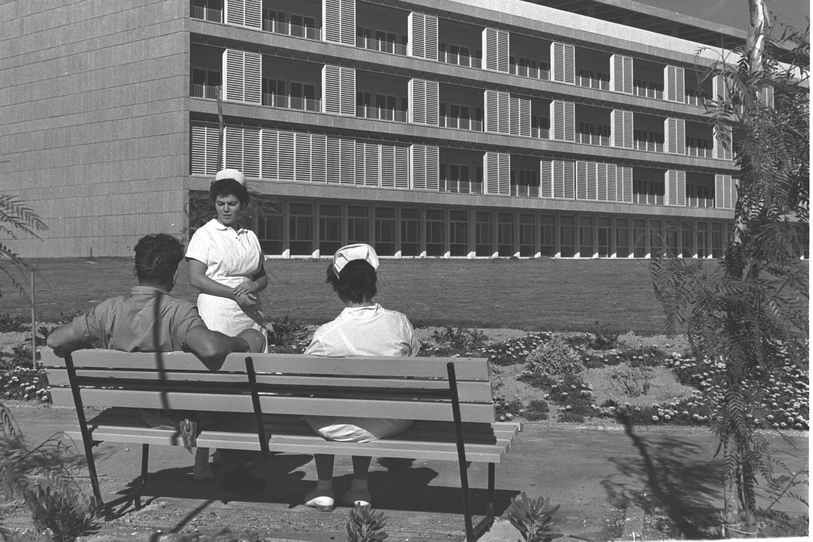 בית החולים המרכזי לנגב (המרכז הרפואי סורוקה) באוקטובר 1959